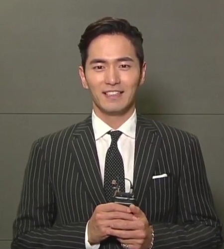 드라맥스 굿바이미스터블랙 ID - 이진욱